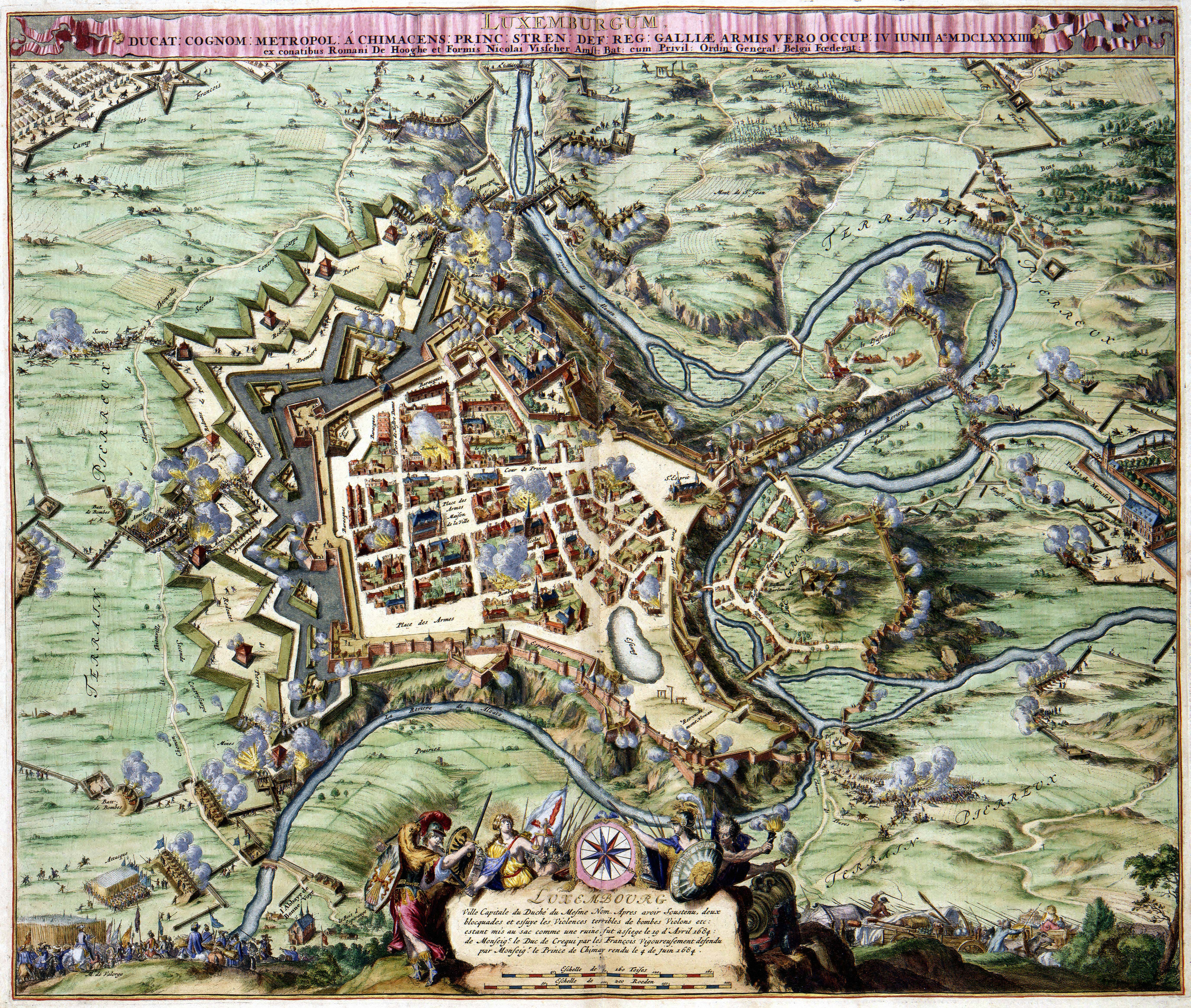 Deel: 2; Onder de kaart een toelichting in het Frans: LUXEMBOURG Ville Capitale du Duché du Mesme Nom. Apres avaoir Soustenu, deux blocquades et essuye les Violences terribles de bombes Violons etc: estant mis au sac comme une ruine, fut assiege le 19 dAvril 1684: de Monseig.r le Duc de Crequi par les Francois Vigoureusement defendu par Monseig.r le Prince de Chimay rendu le 4 de juin 1684.